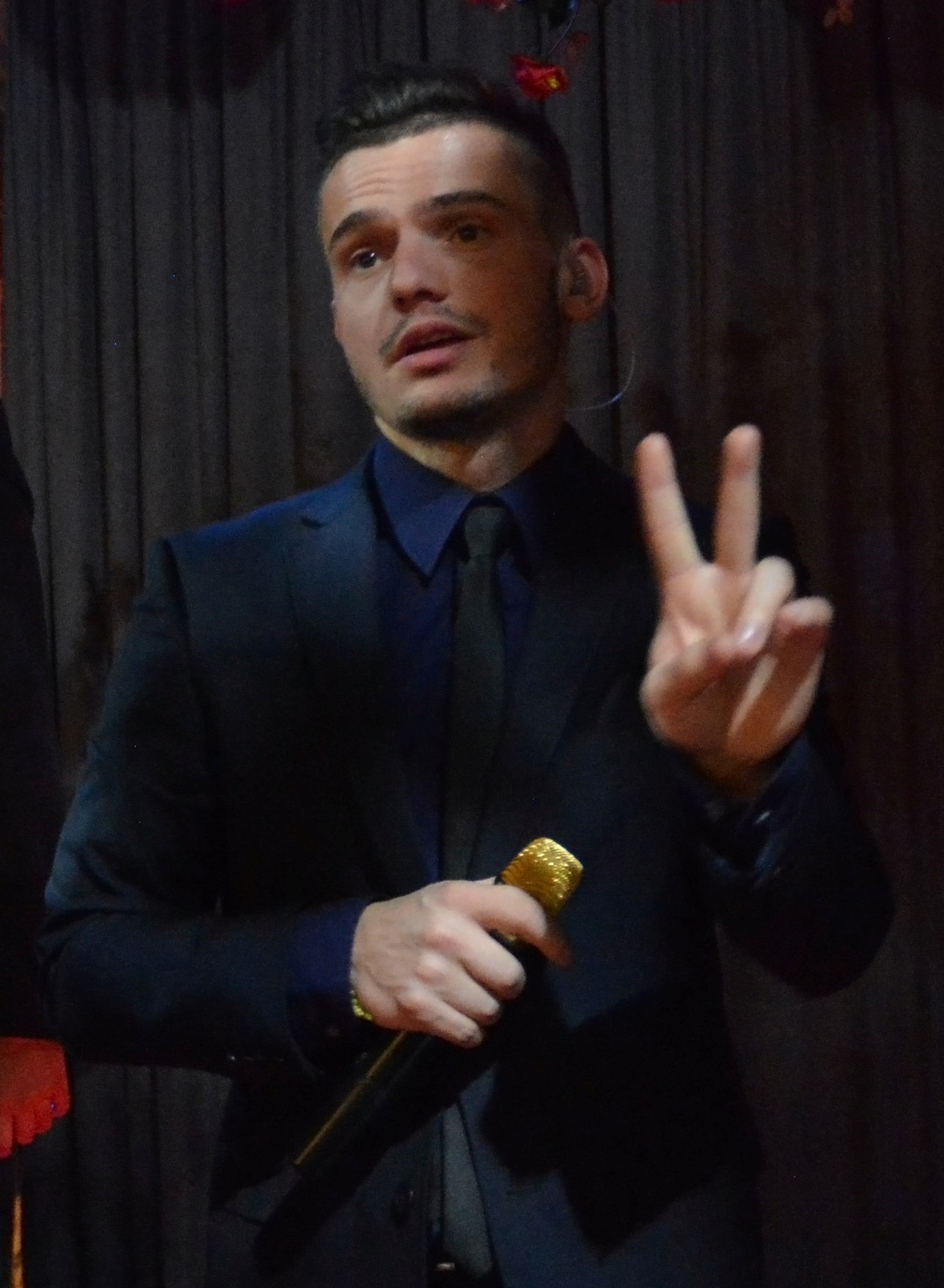 Группа 5sta Family на вечеринке New Wave Junior Party (клуб Maxim Bar)